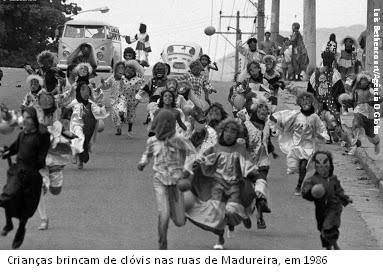 Crianças brincando no carnaval em Madureira em 1986 de bate bate bola ( subúrbio do RJ )